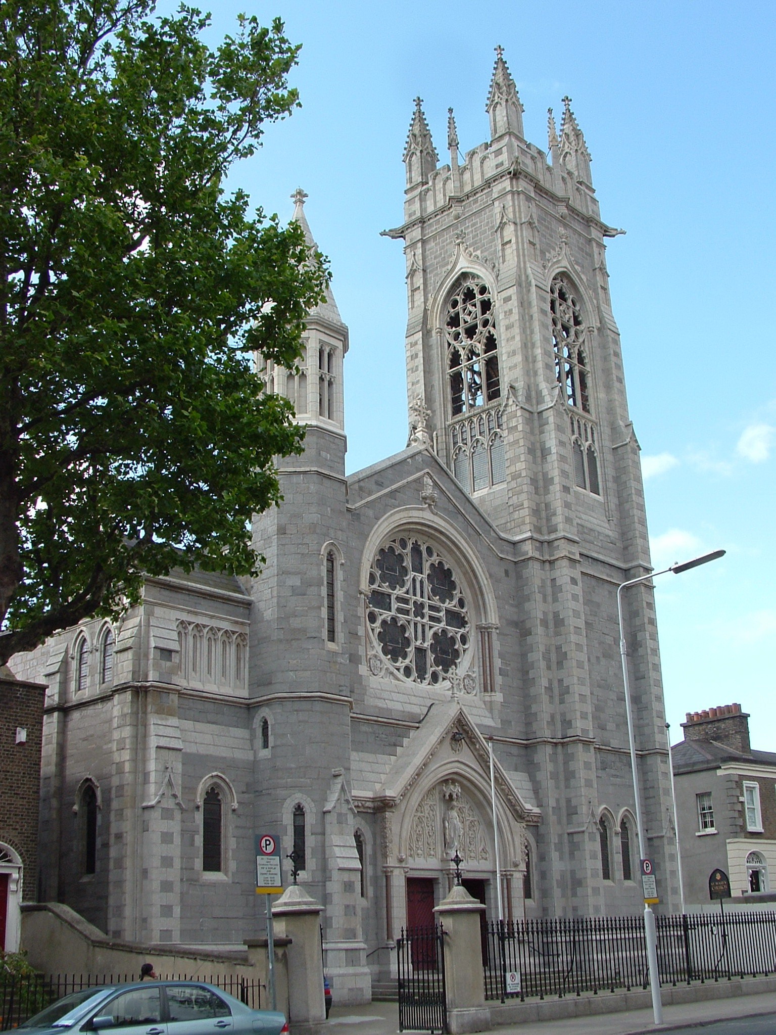 St Mary's Church - Haddington Road - Dublin